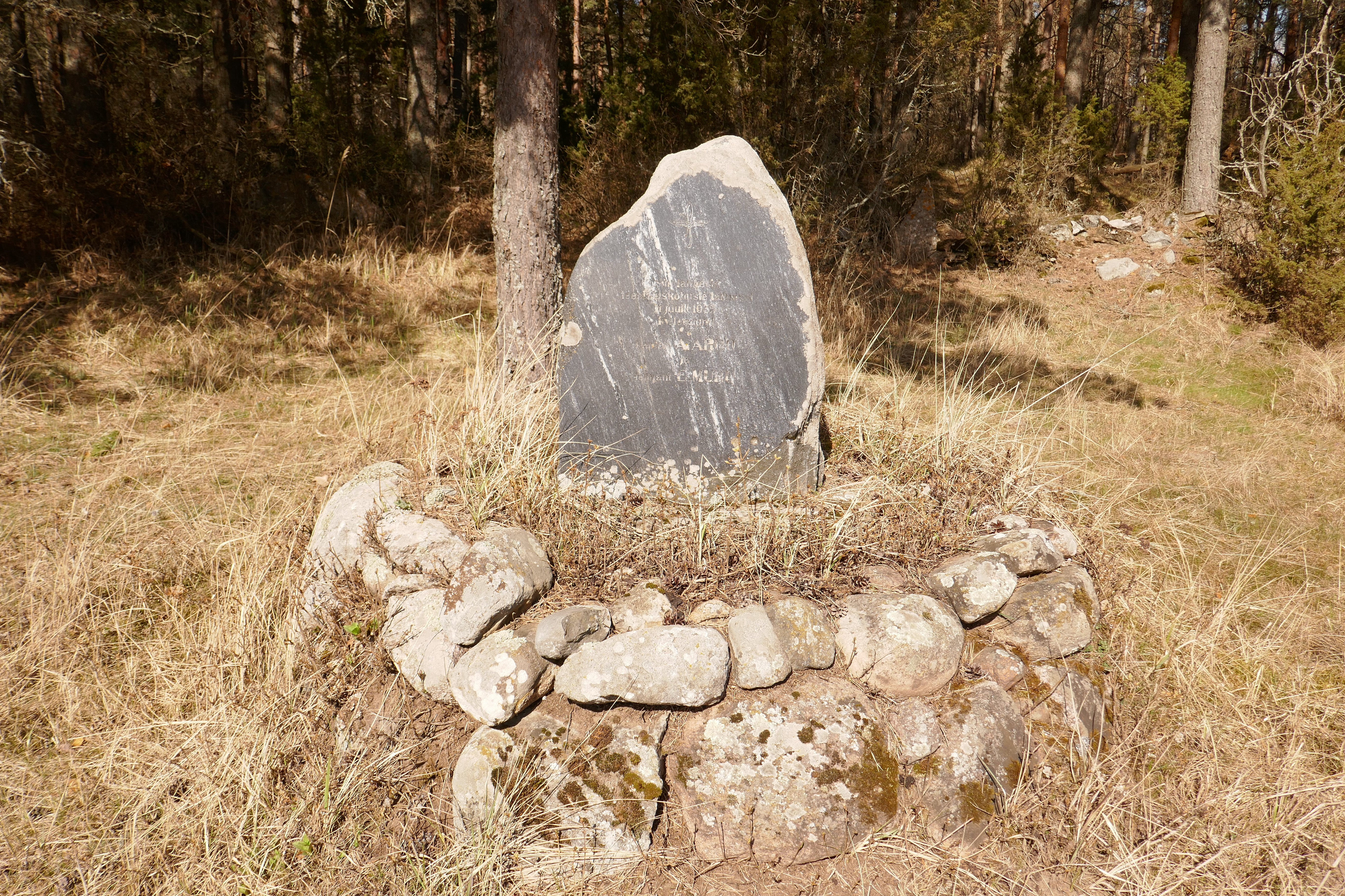 Mälestuskivi Valkla õppevälja lennuõnnetuses (1935) hukkunud lenduritele.